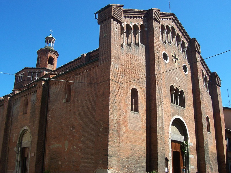 Pavia - Chiesa di S. Teodoro